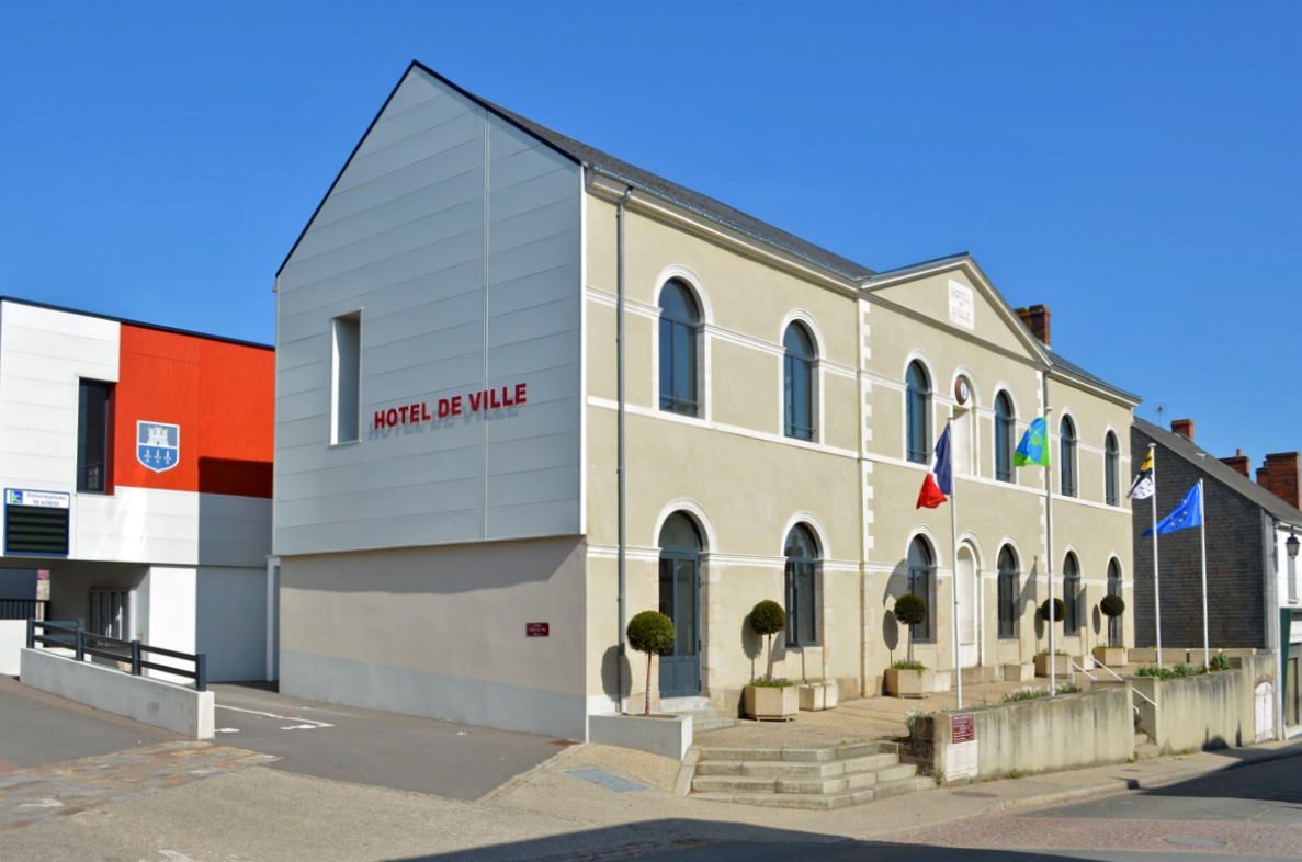 Hôtel de Ville - Legé (Loire-Atlantique)